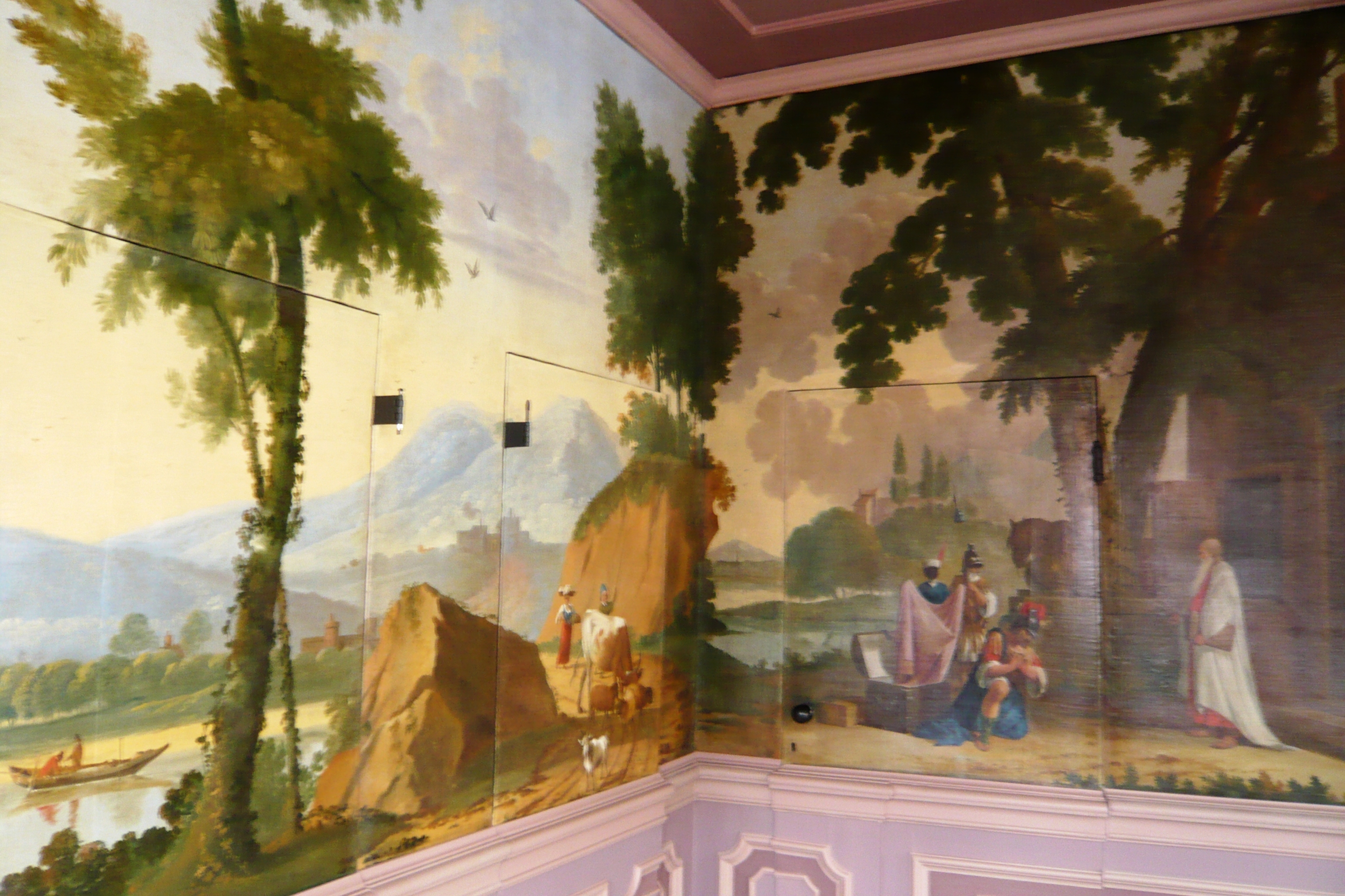 Muurschildering